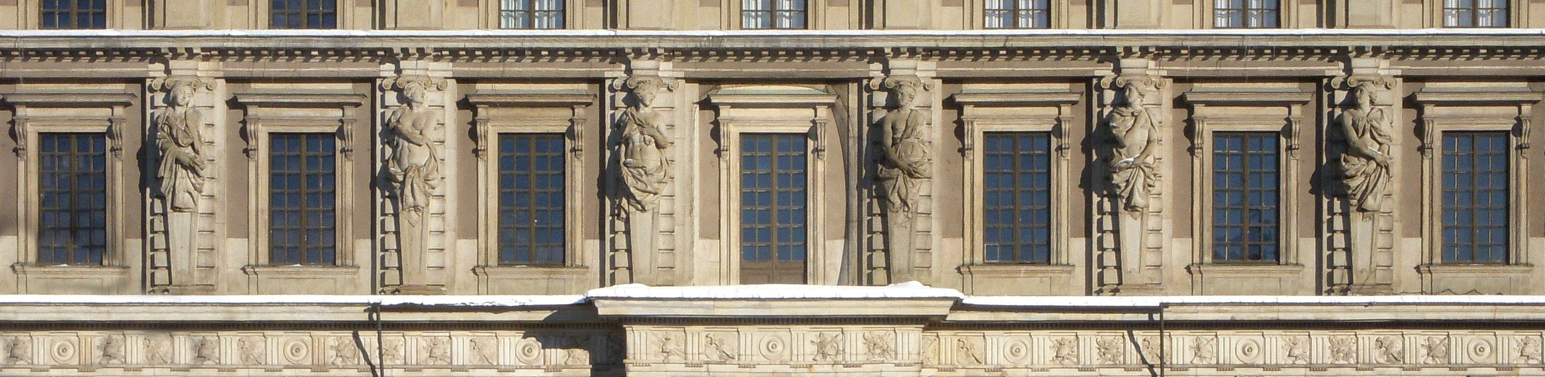 Karyatiderna av Charles Guillaume Cousin, på västfadasen (yttre borggården), Stockholms slott